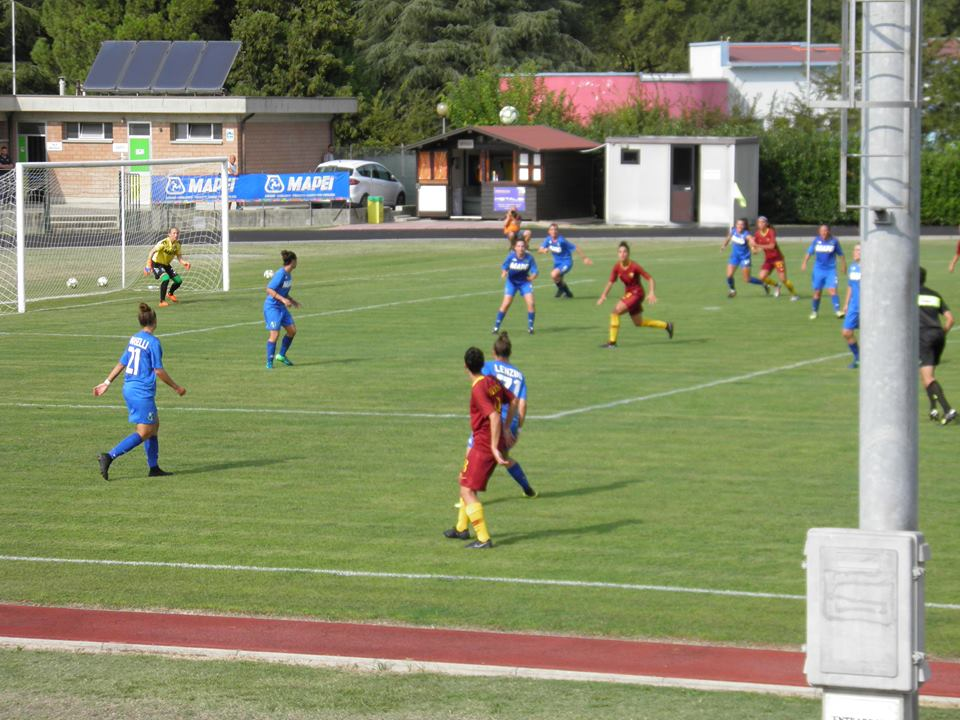 San Polo d'Enza, stadio comunale: Incontro tra il Sassuolo e la Roma, prima giornata di Serie A di calcio femminile della stagione 2018-2019.